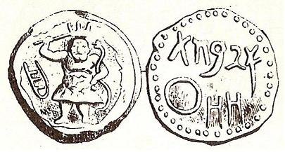 Semis de la seca d'Ebusus